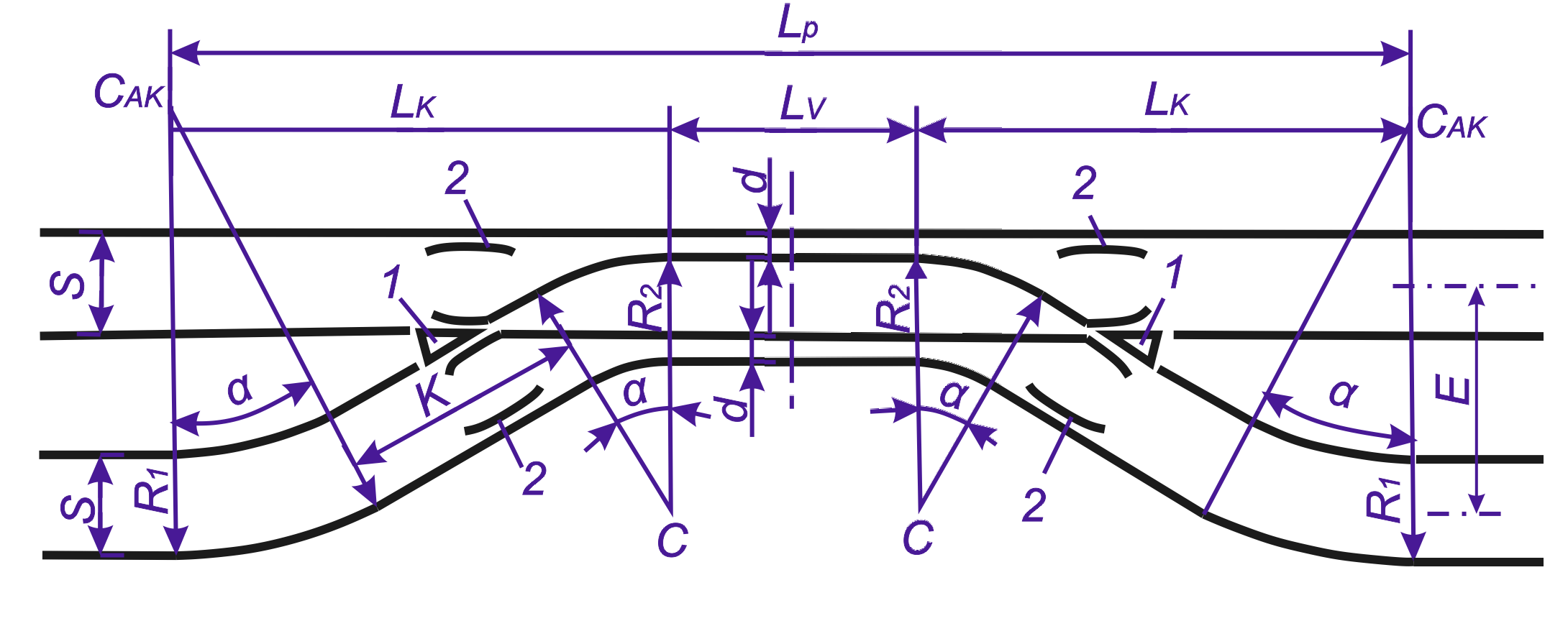 Parasts ceļa pinums